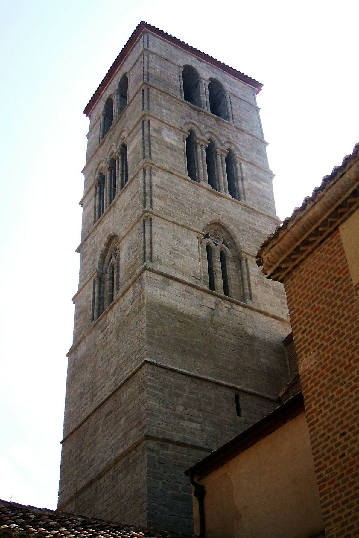 Torre de la Iglesia de San Martín, Valladolid, España